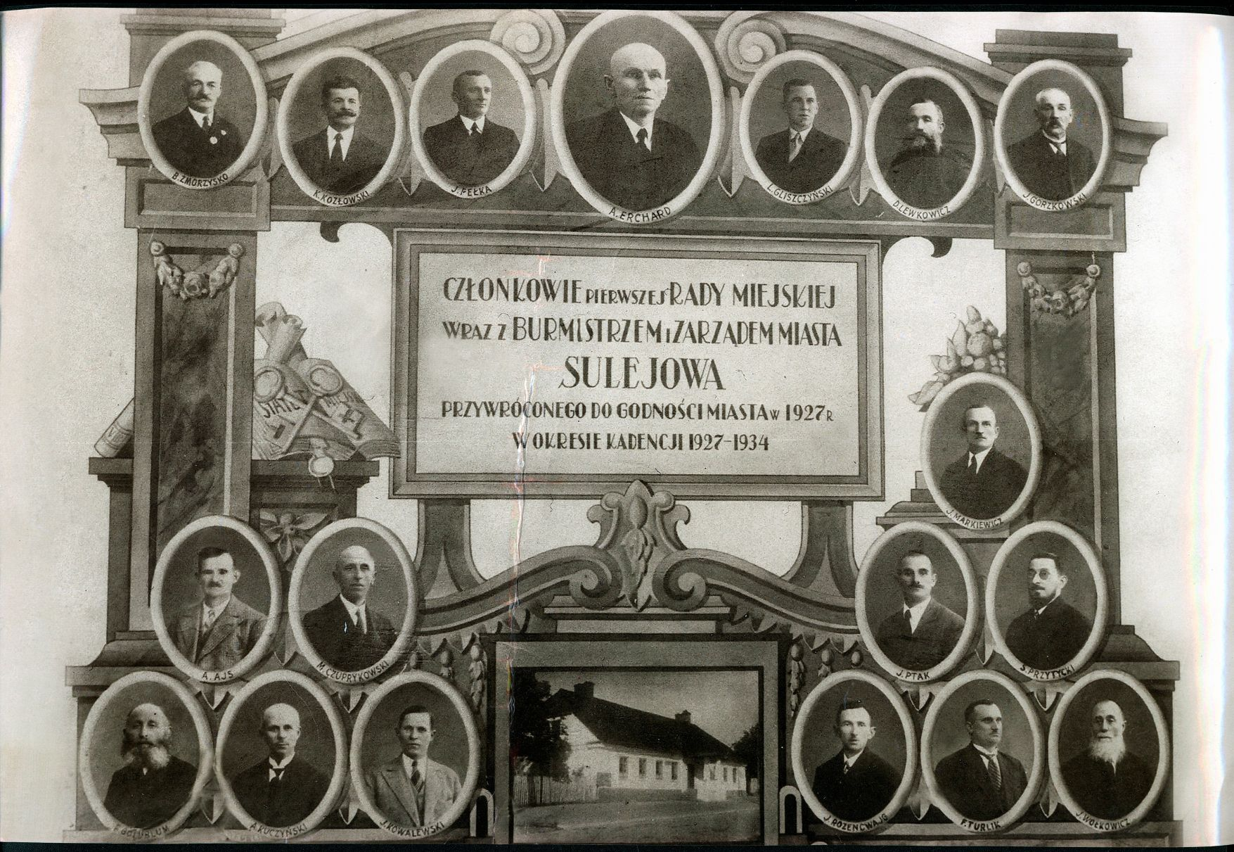 Członkowie pierwszej Rady Miejskiej w Sulejowie po odzyskaniu praw miejskich w 1927 r.